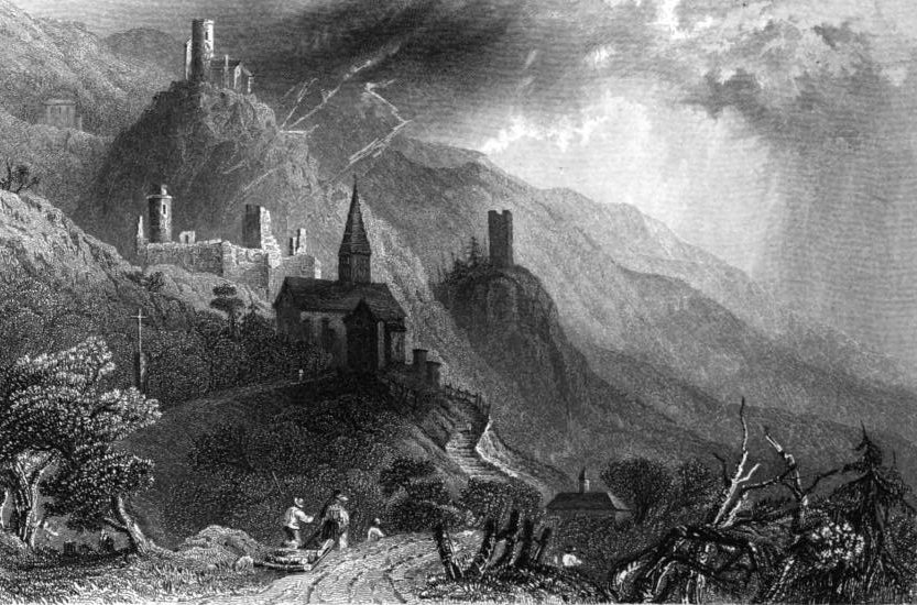 Stahlstich mit den Südtiroler Burgen Reichenberg und Rotund sowie einer Kapelle und dem Turm Helfmirgott